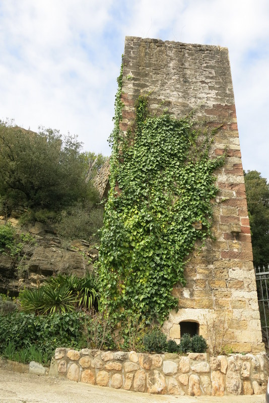 Torre de Mont-ravà, a Alcover, comarca de l'Alt Camp - Catalunya